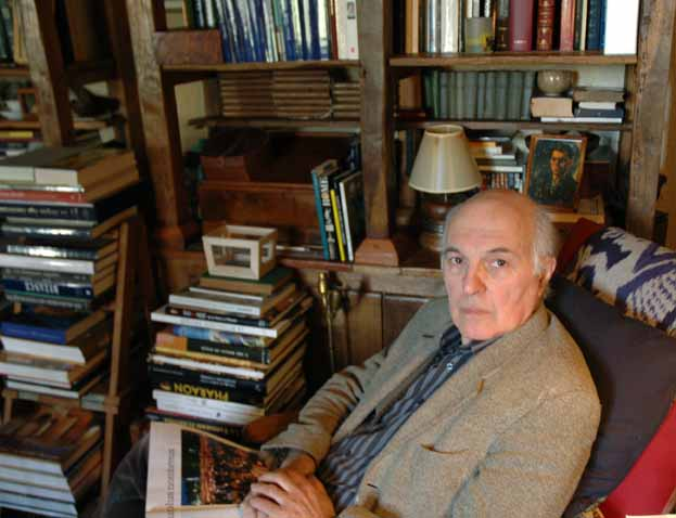 Portrait de Goudji